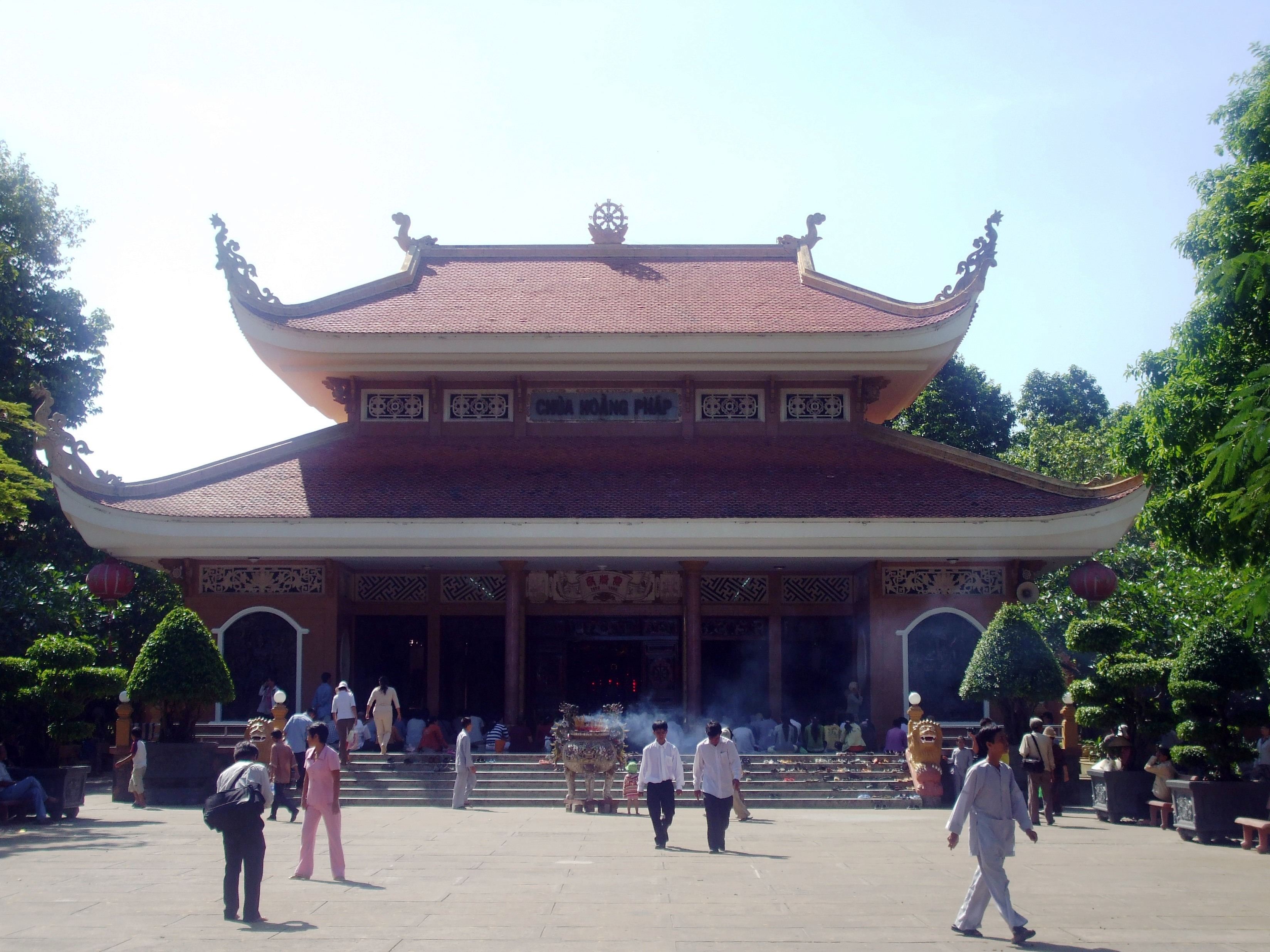 Chính điện chùa Hoằng Pháp tại thành Phố Hồ Chí Minh (Việt Nam).